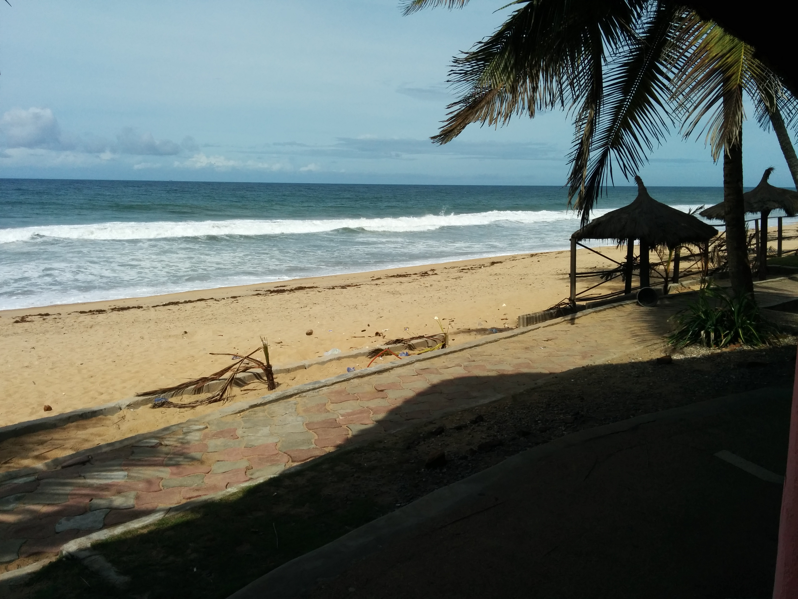 Tereso Hotel Grand Bassam, le bord de la mer